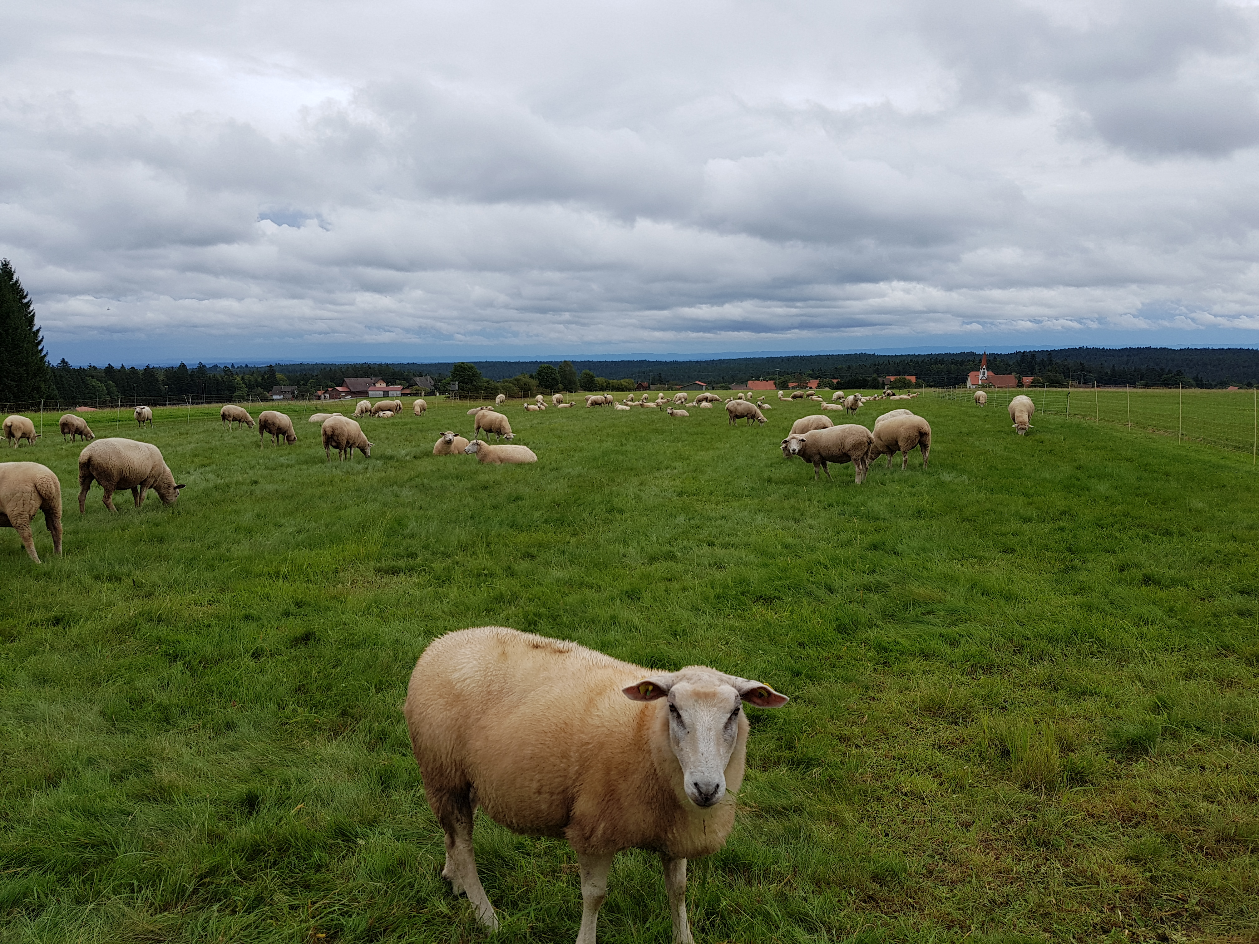 Bad Wildbad Aichelberg schöne Ortsansicht mit dem Aichelberger Blick und den Schafen als typische Weidetiere. (Bild vom Sommer 2017)